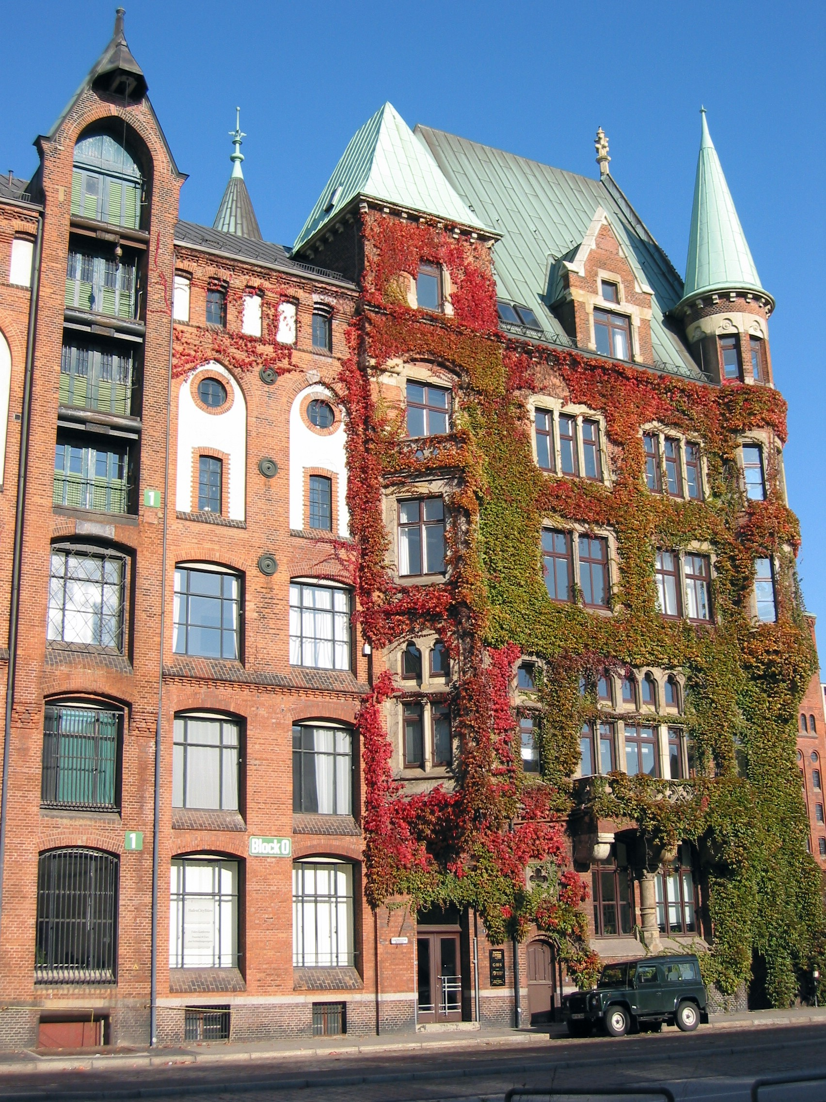 Hafenstadt Hamburg. Hier das HHLA-Verwaltungsgebäude Bei St. Annen 1. This is a photograph of an architectural monument.